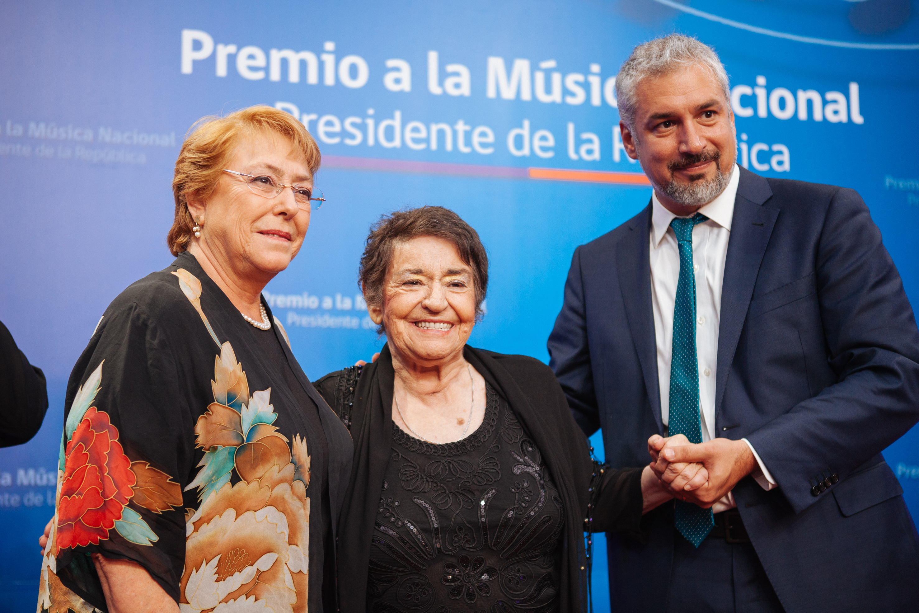 Diciembre 21, 2016. Presidenta Michelle Bachelet entregó el Premio a la Música Nacional Presidente de la República 2016: En la fotografía Cecilia Pantoja, ganadora en categoría música popular.